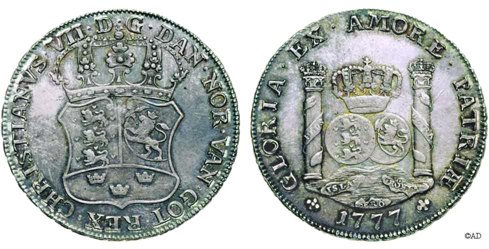 Norwegischer Piaster für den Ostindienhandel.